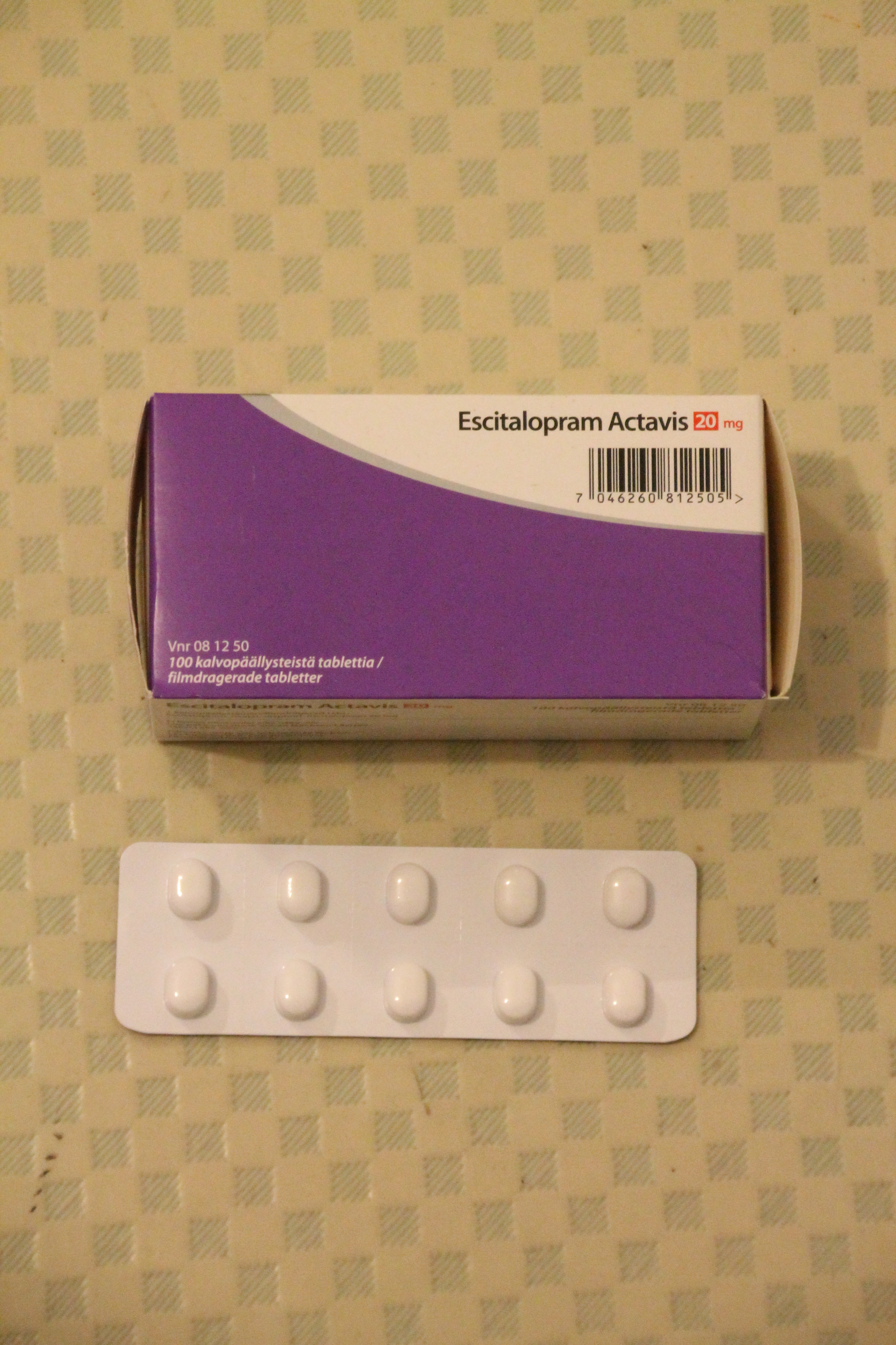 Escitalopram Actavis 20mg -lääkepakkaus ja levy.